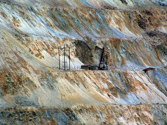 Berkeley Pit terrain